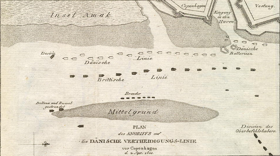 Engels aanvalsplan van de slag bij Kopenhagen.